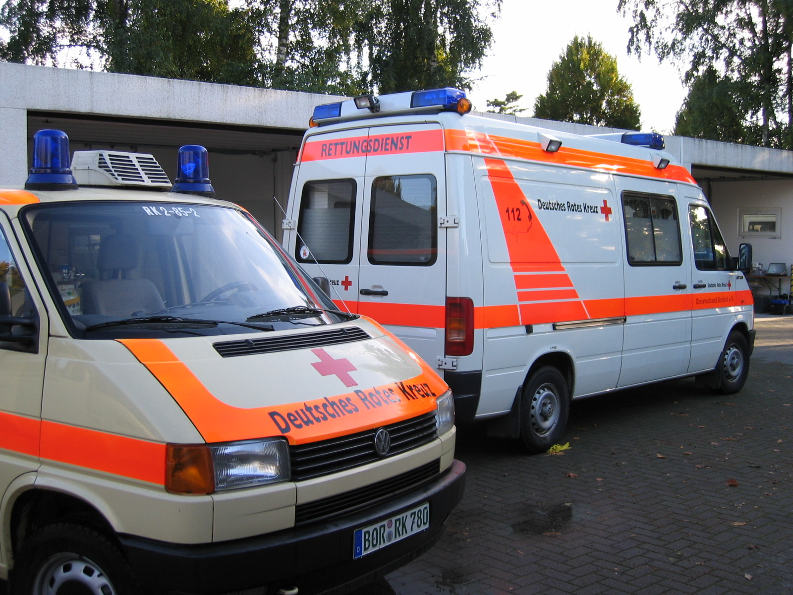 Krankentransportwagen (KTW) und Notfall-Krankentransportwagen (N-KTW) des DRK Kreisverband Bocholt e.V.